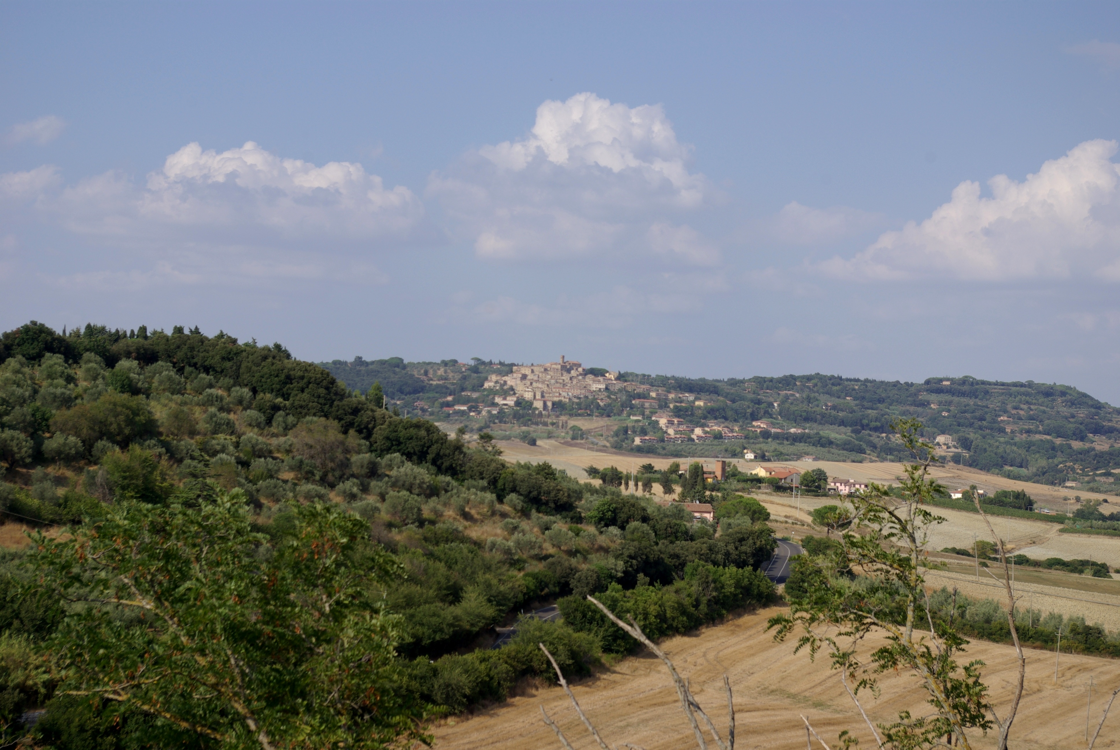 Blick von Bibbona nach Casale Marittimo